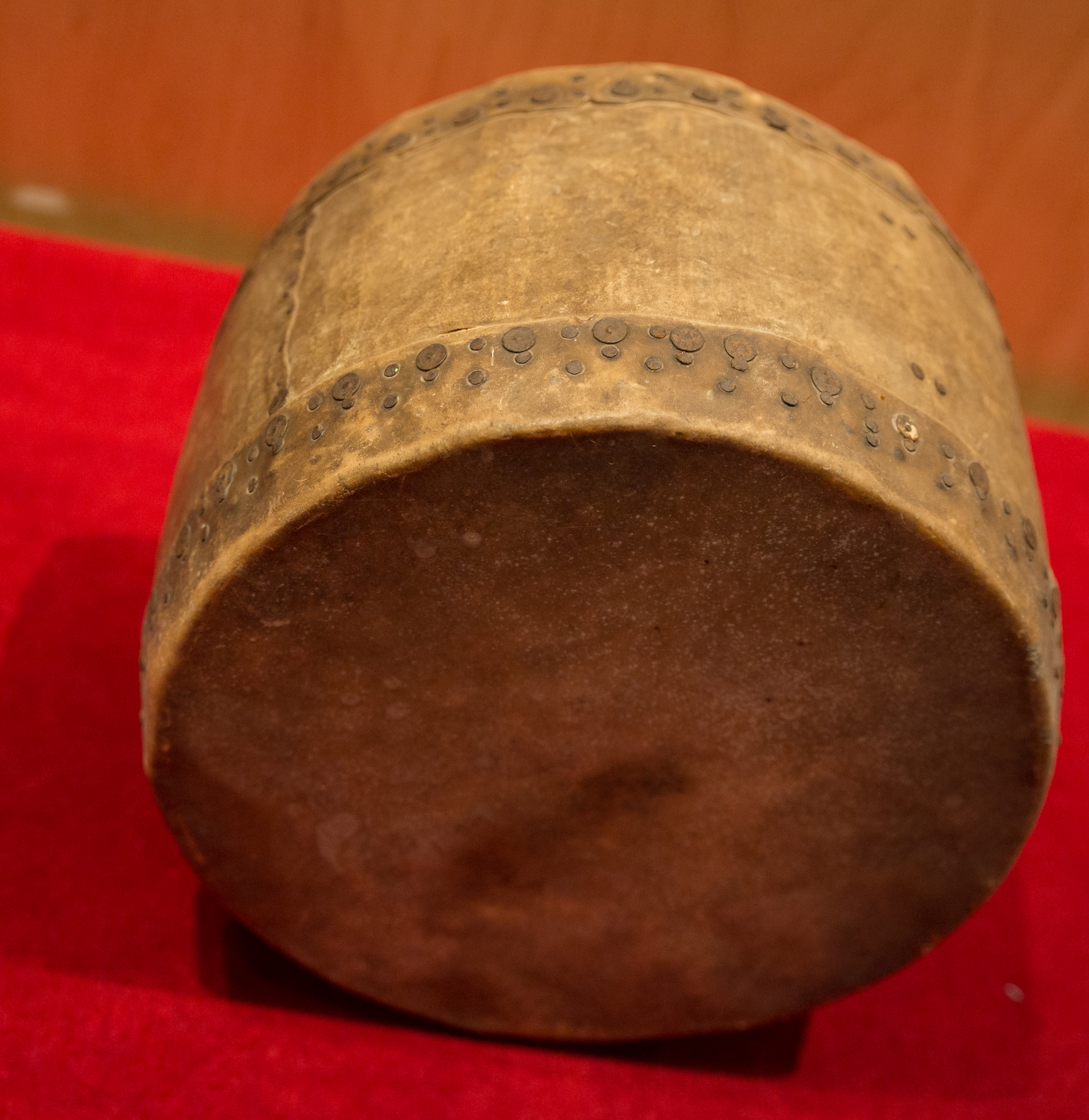 Buk, exposat a Eolssigu! Els sons de Corea